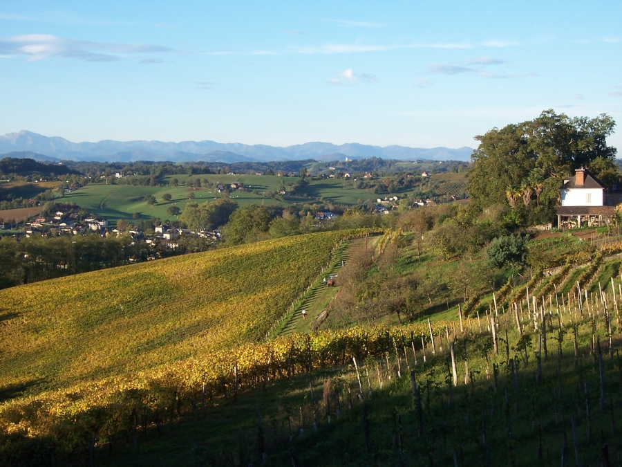 Vignoble à Monein au moment des vendanges (Monein, Pyrénées-Atlantiques)